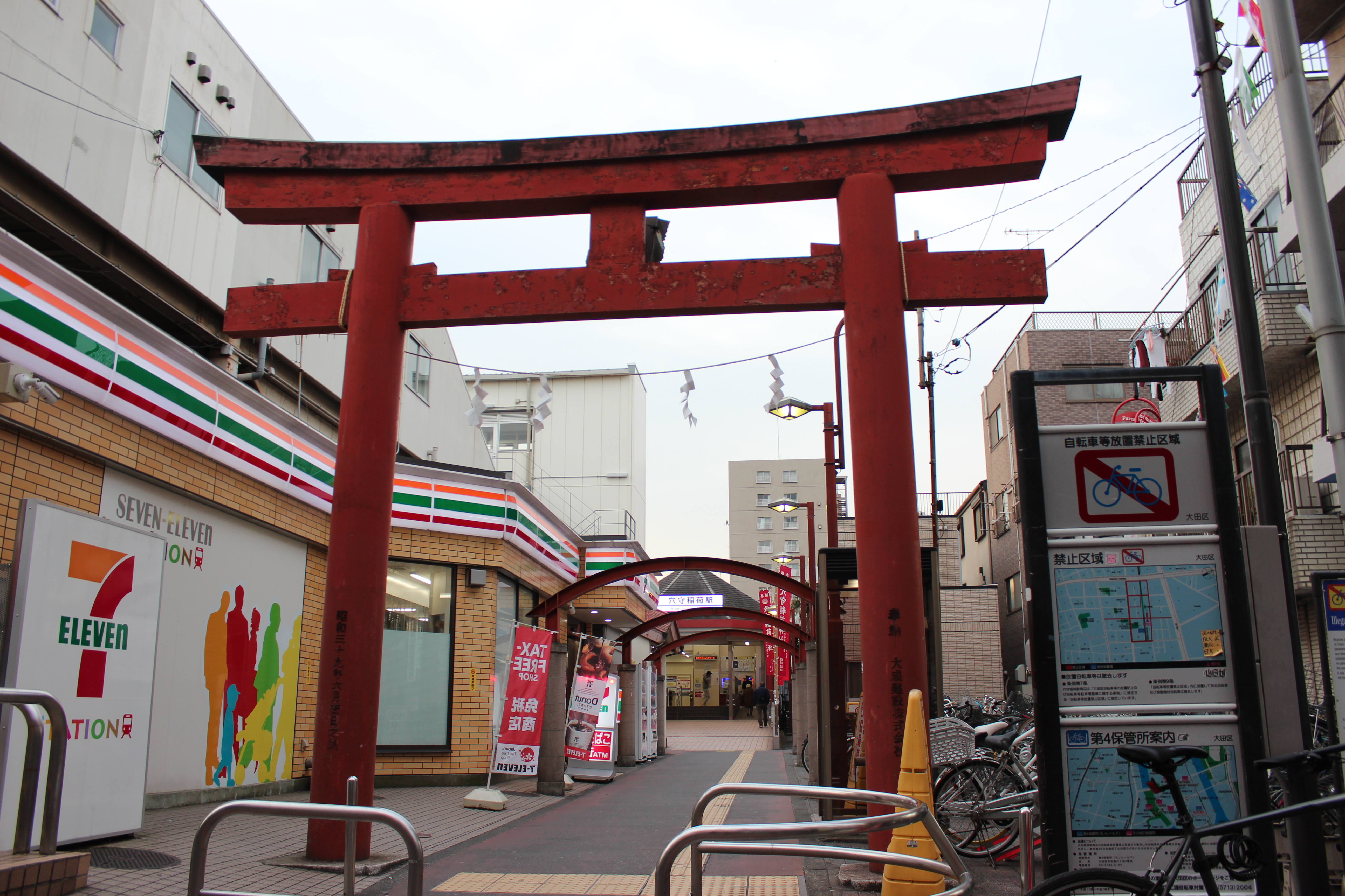 穴守稲荷駅前広場